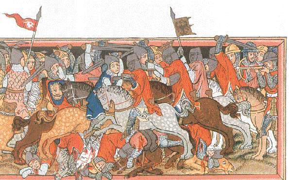 Darstellung einer Schlacht Karls des Grossen. Es handelt sich um eine (irrtümlich) gespiegelte Wiedergabe einer Miniatur von Kassel, Universitätsbibl. / LMB, 2° Ms. poet. et roman. 1, fol. 7v. Nicht gespiegelte Version: File:Schlacht bei Mühldorf3.jpg. Dargestellt ist nicht die Schlacht bei Mühldorf (irreführende Dateinamen).